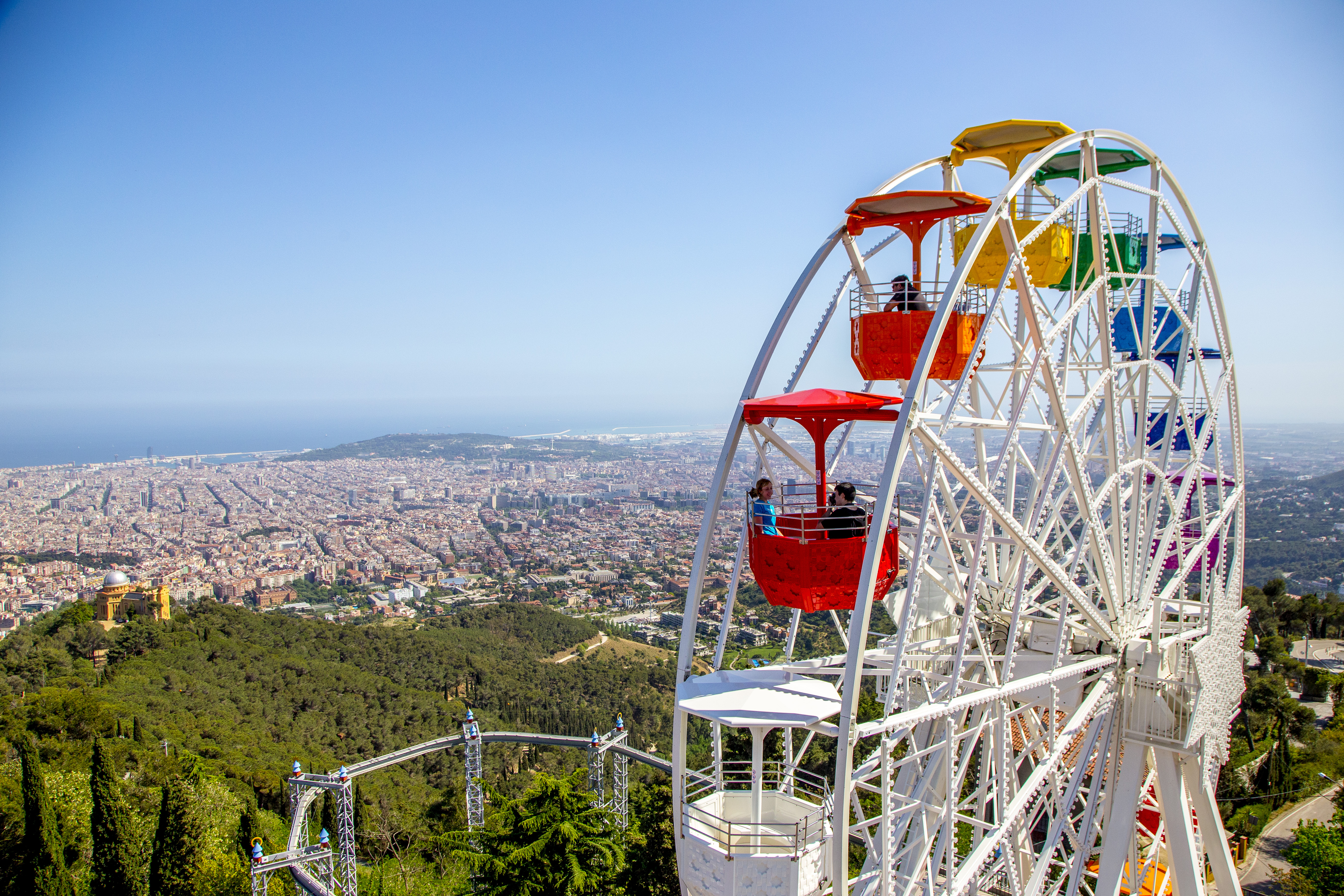 Vistas y la Noria del Tibidabo